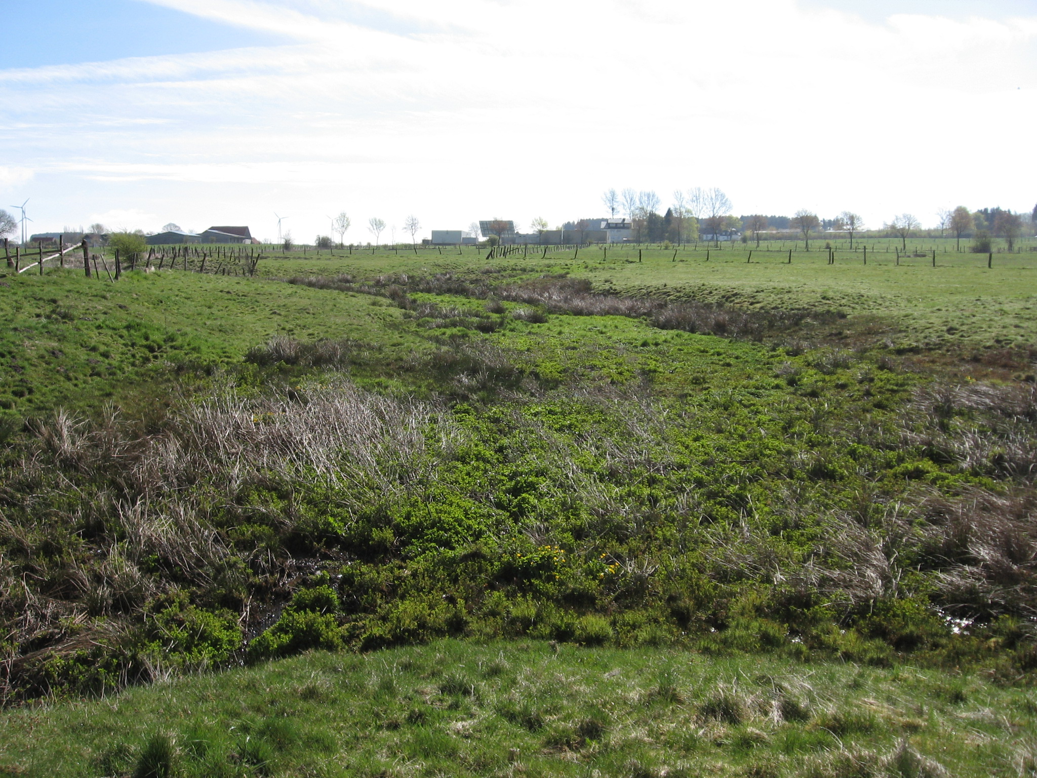 Sickerquellenbereich im Naturschutzgebiet Königswiese. Im Bildhintergrund Brilon-Thülen.